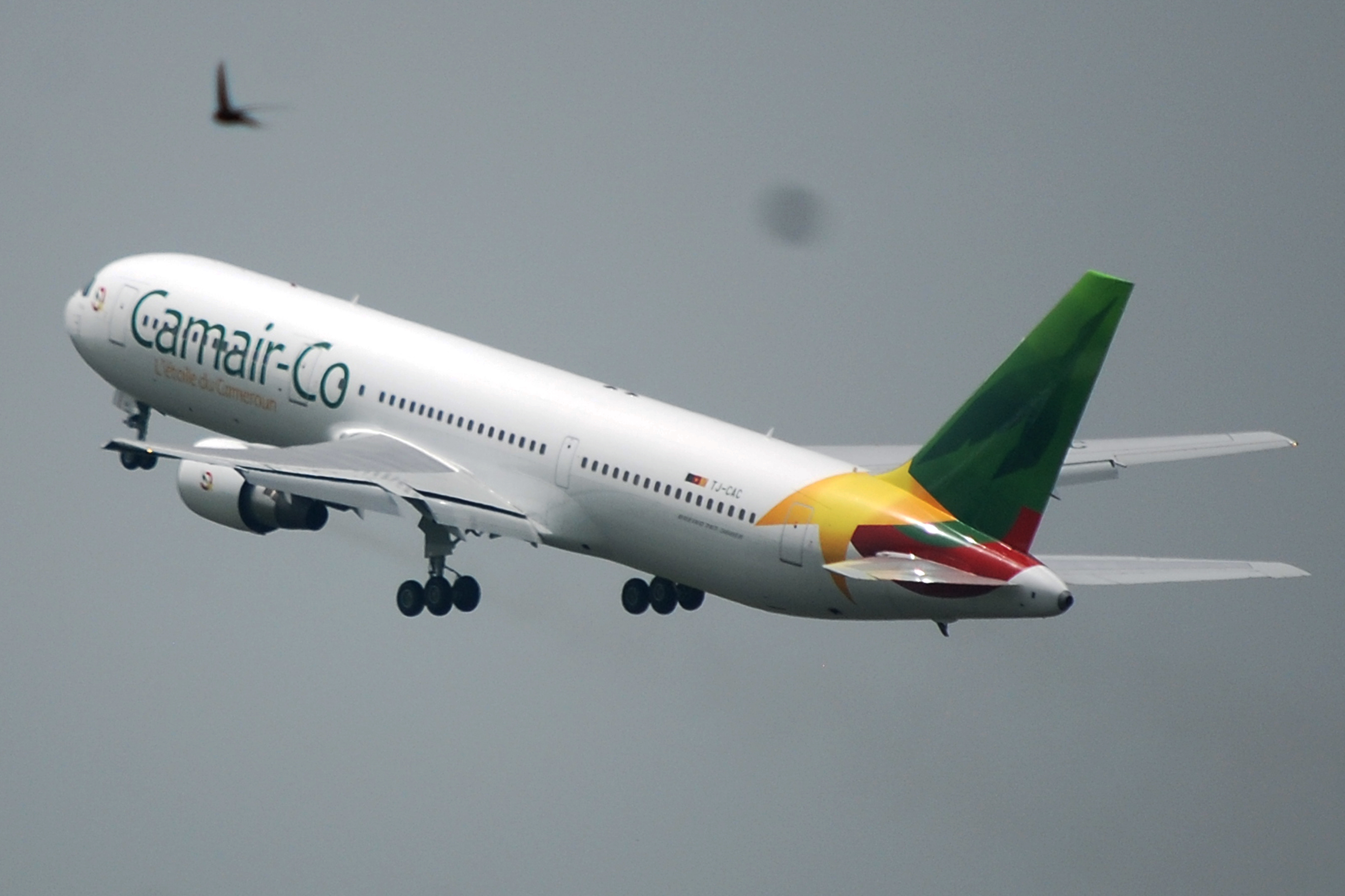 Le DJA, Boeing 767 de CAMAIRCO lors du vol inaugural à l’aéroport international de Douala au Cameroun This is an image with the theme "Africa on the Move or Transport" from: Cameroon